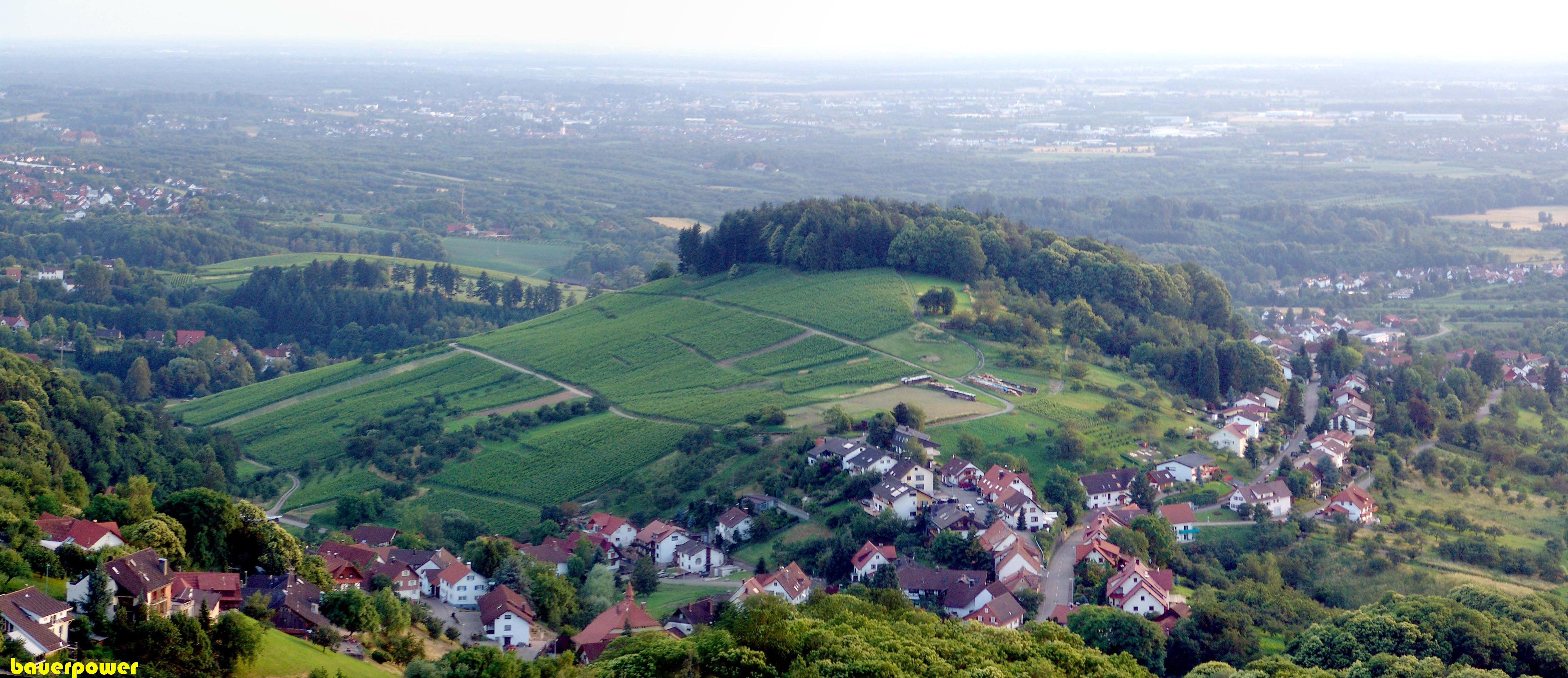 Panorama nach Westen (Bühl-Waldmatt)